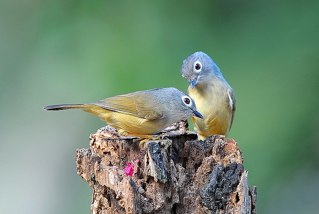 Gray-cheeked Fulvetta (Alcippe morrisonia)